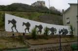 Monumento salinari